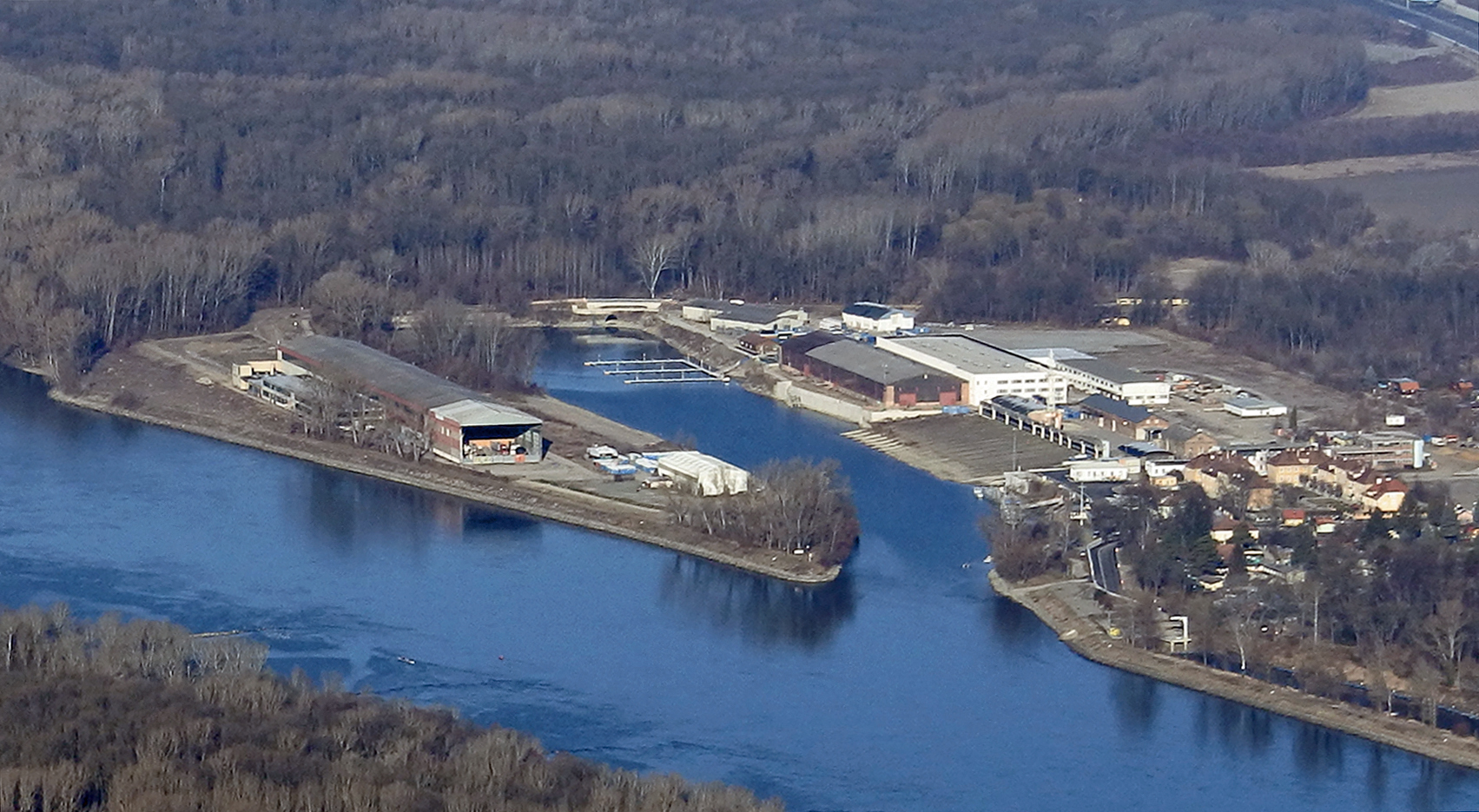 Luftaufnahme der Schiffswerft Korneuburg